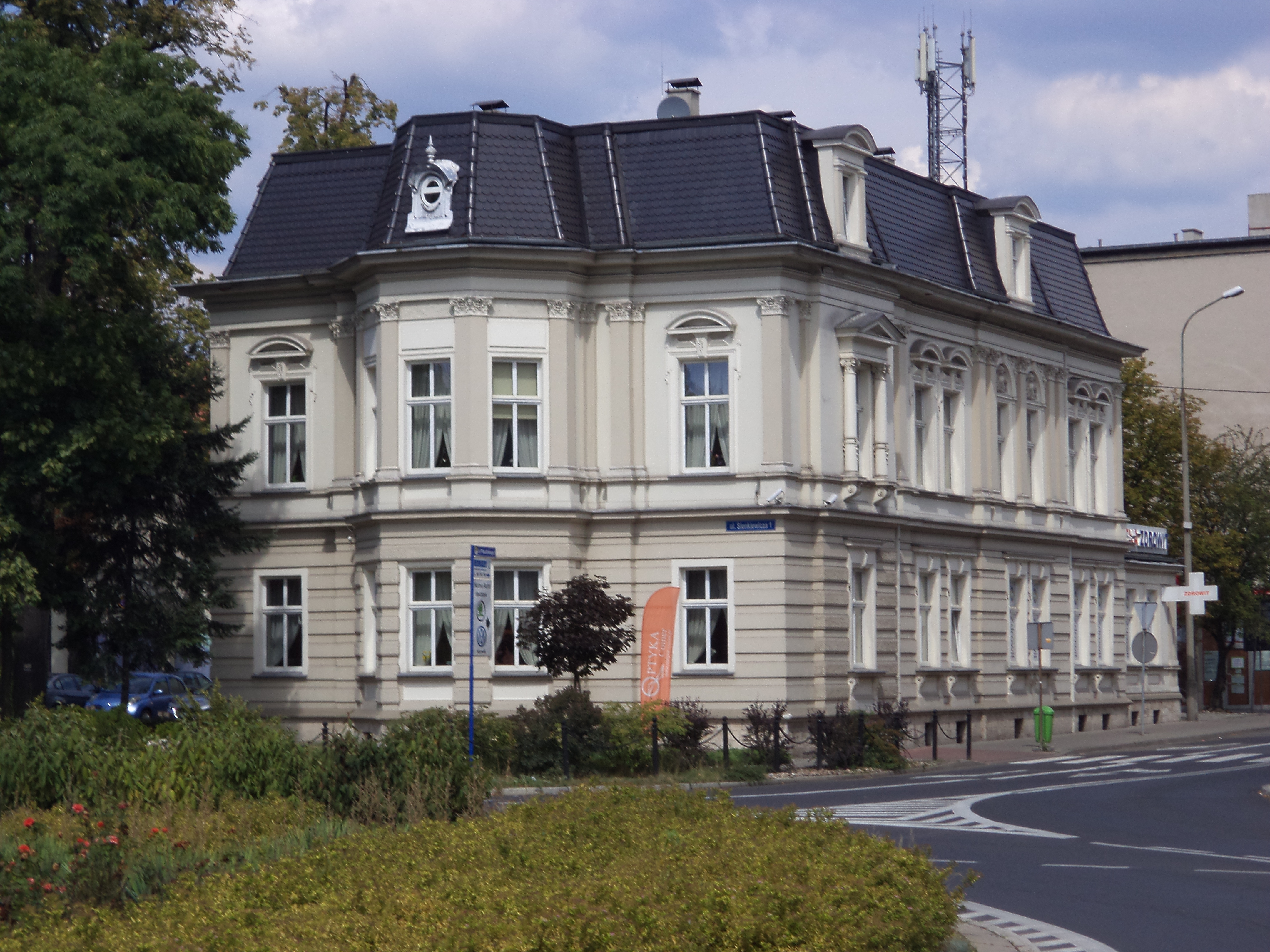 Budynek przy ul.Henryka Sienkiewicza 1 w Tarnowskich Górach - tzw. Willa Leschnitzera